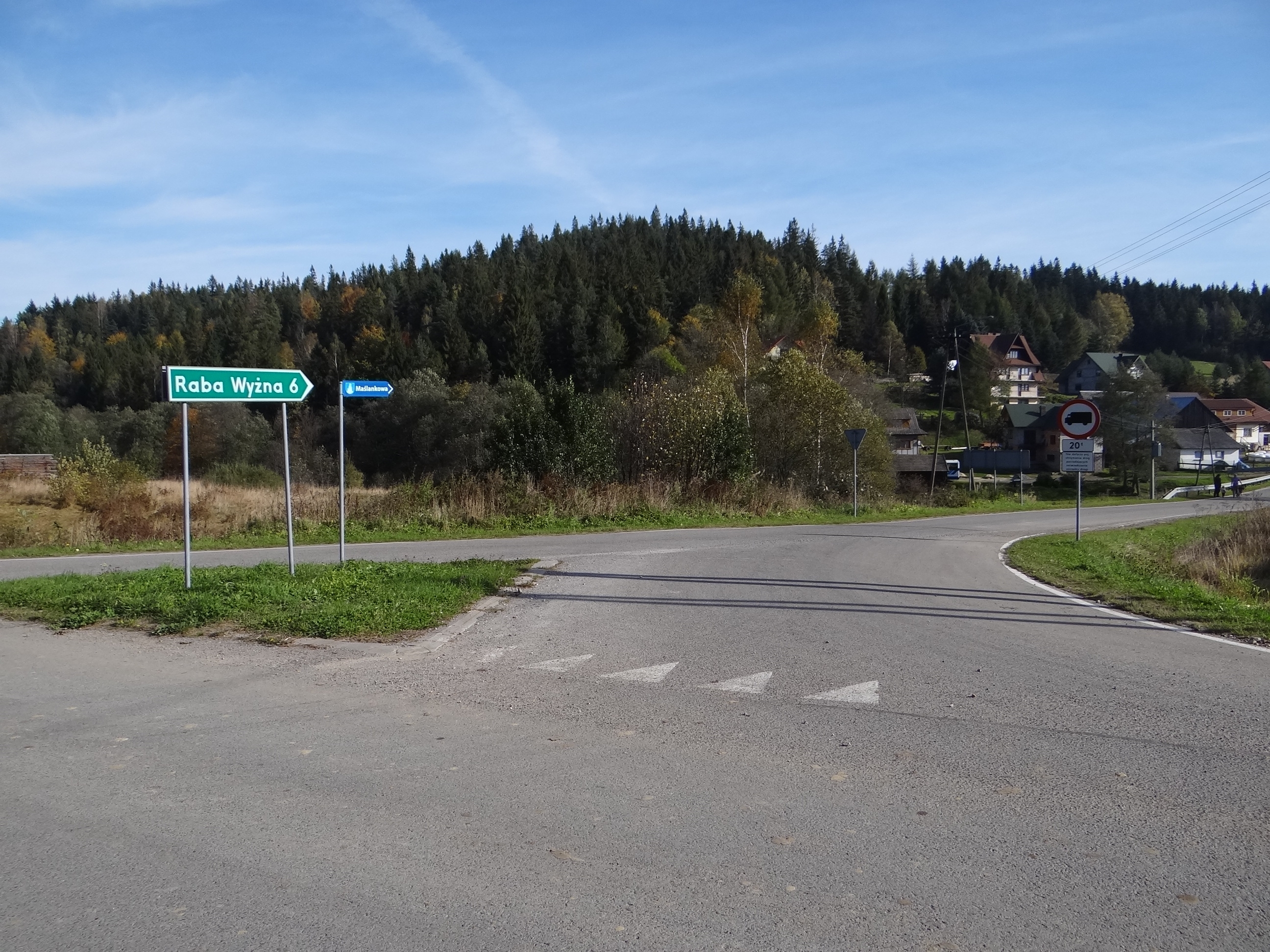 Harkabuz, góra Leszczak i Przełęcz nad Harkabuzem